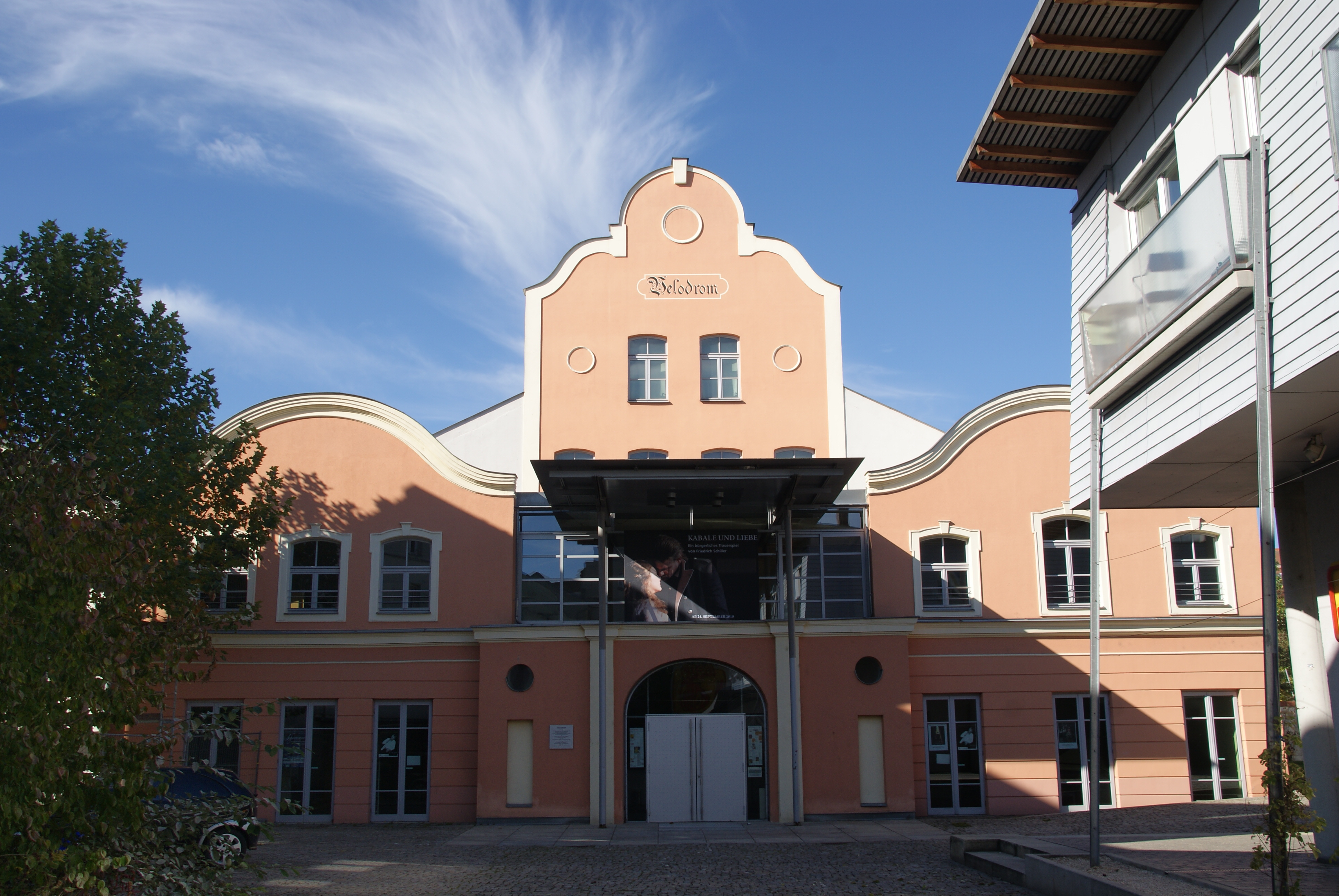 Velodrom, Spielstätte des Theaters Regensburg